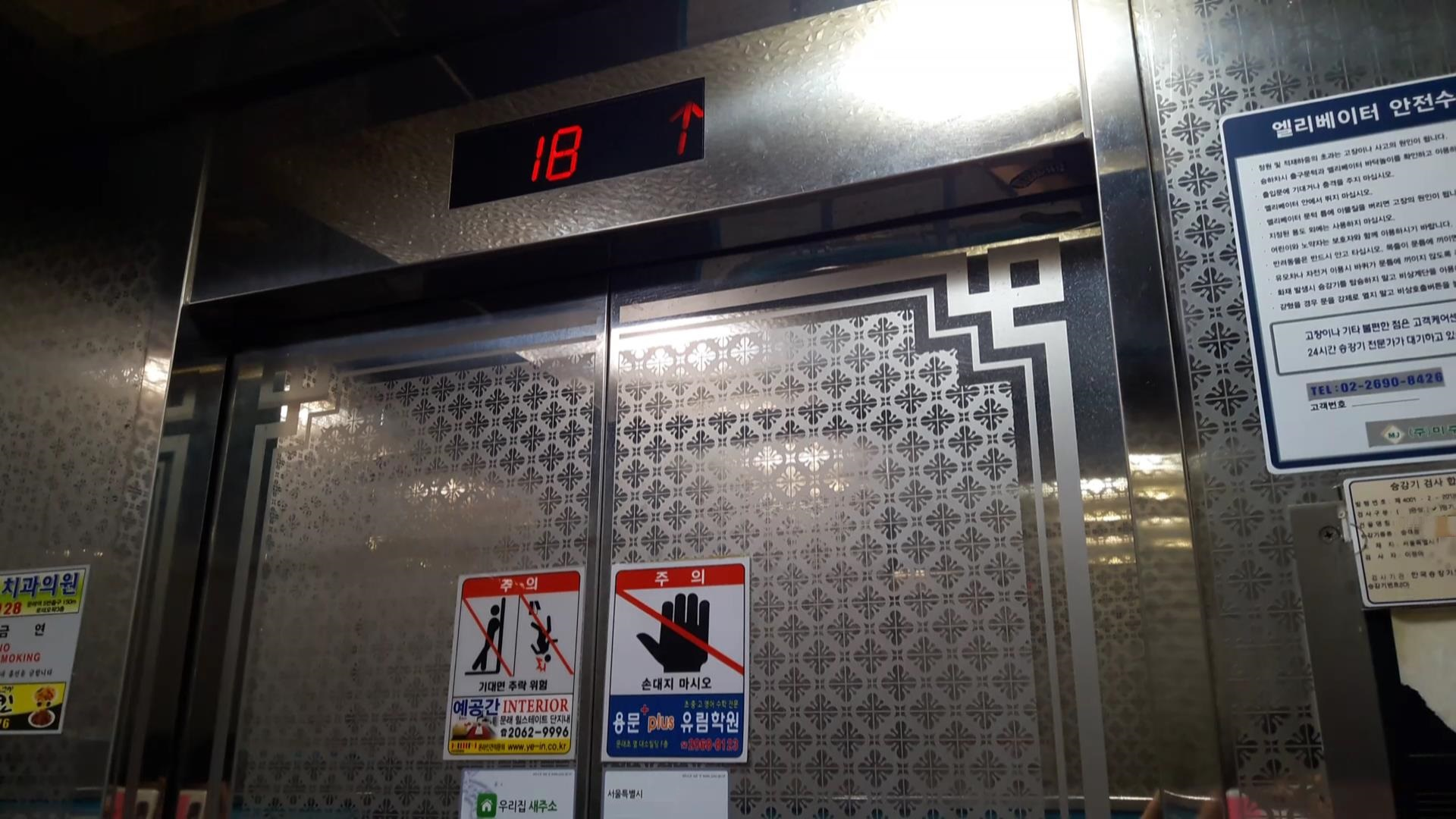 현대엘리베이터 VAC 차내 전경